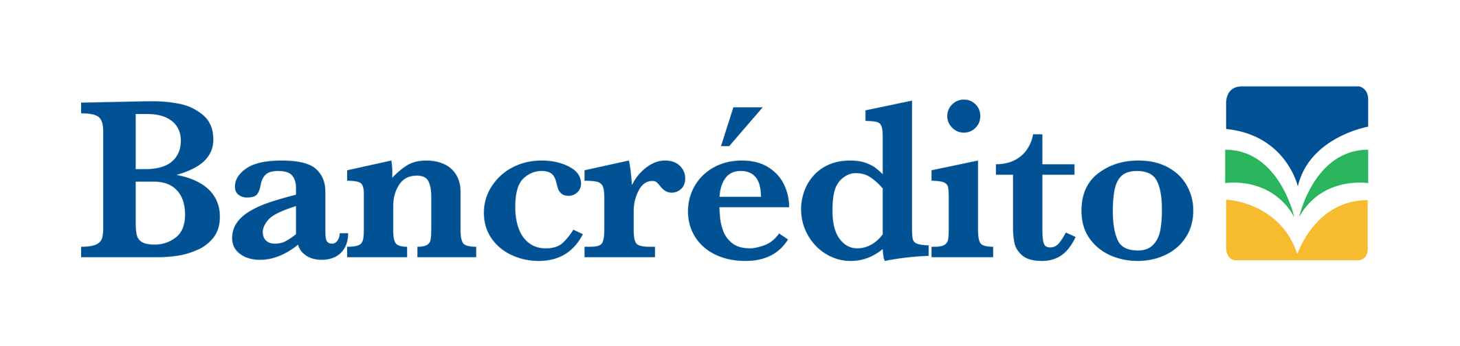 Logo del Banco Crédito Agrícola de Cartago